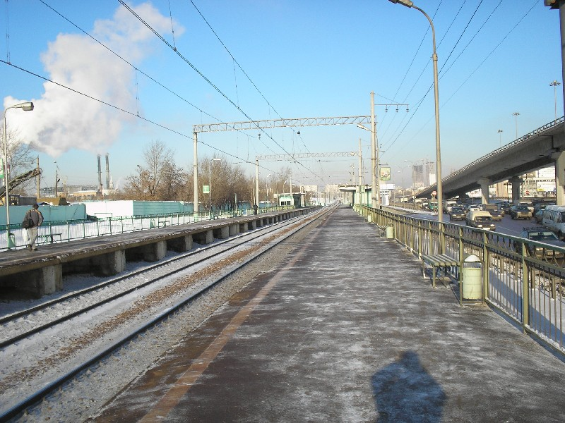 Testowskaja Тестовская.